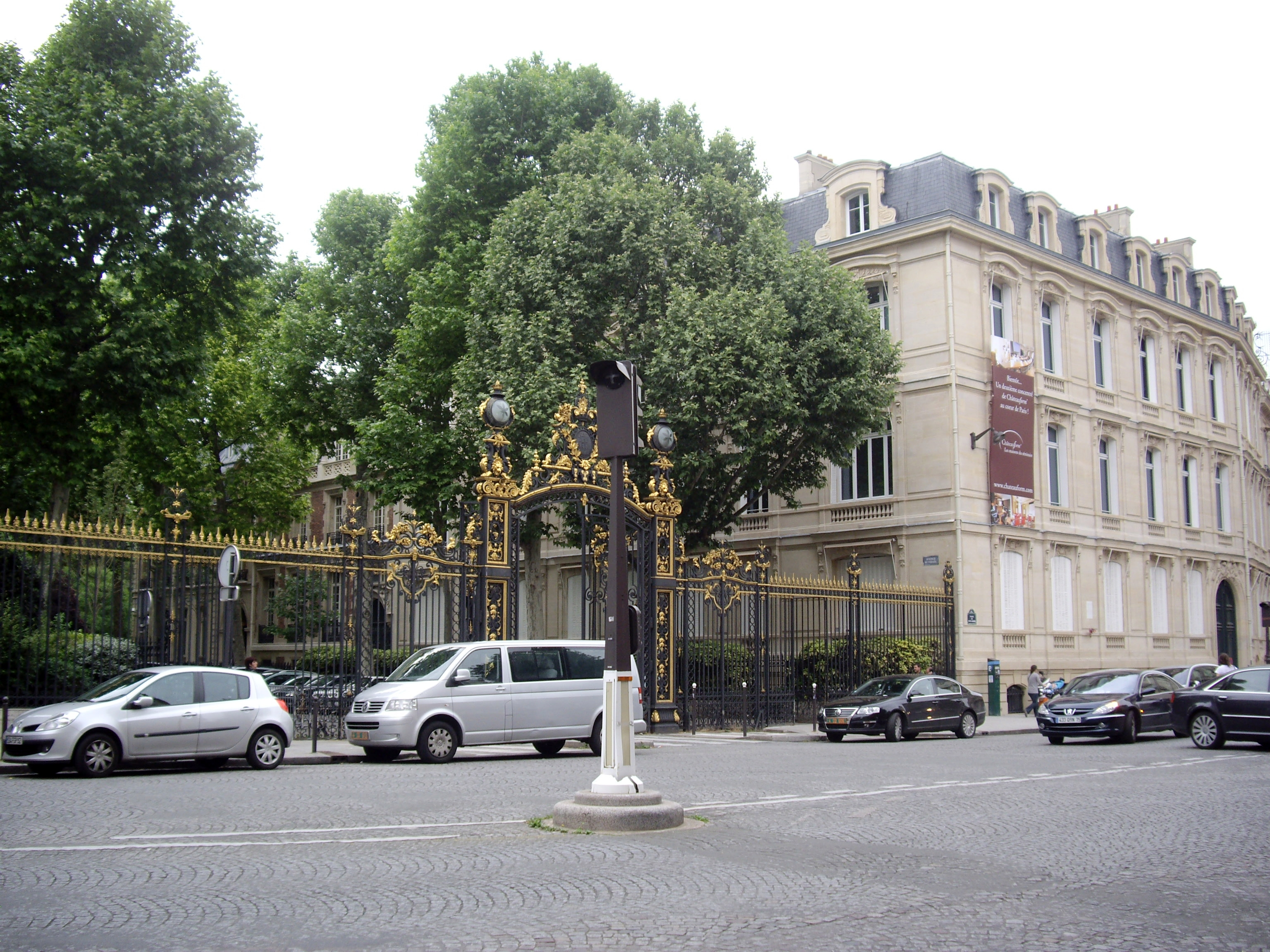 Place de Rio-de-Janeiro, Paris 8e. Entrée de l'avenue Ruysdaël vue depuis la rue de Monceau.